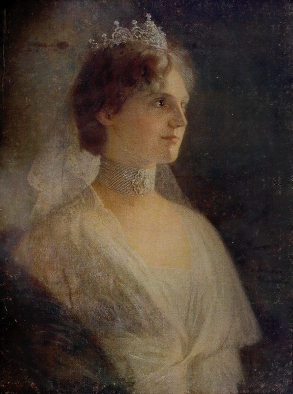 Kaiserin-Zita-von-Österreich